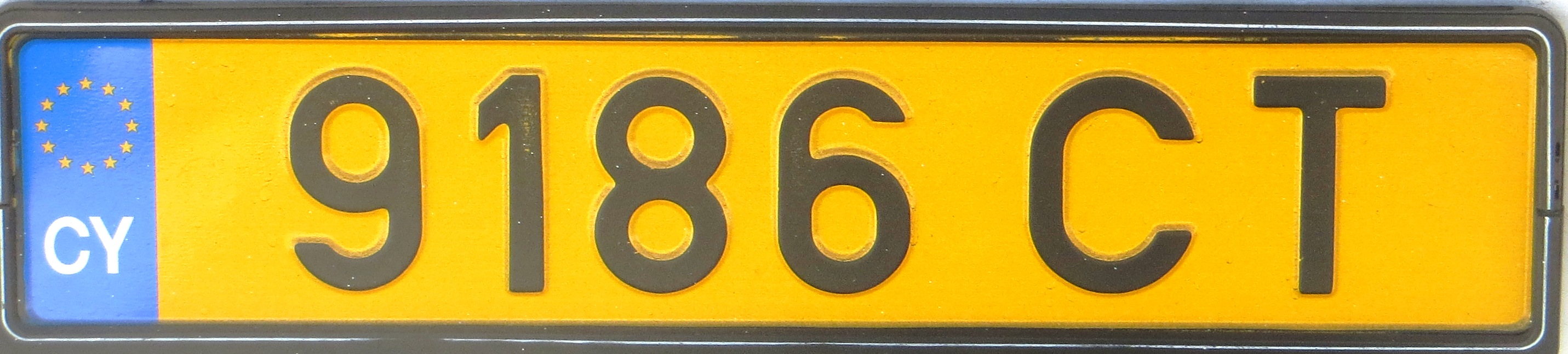 Trailer kentekenplaat Cyprus